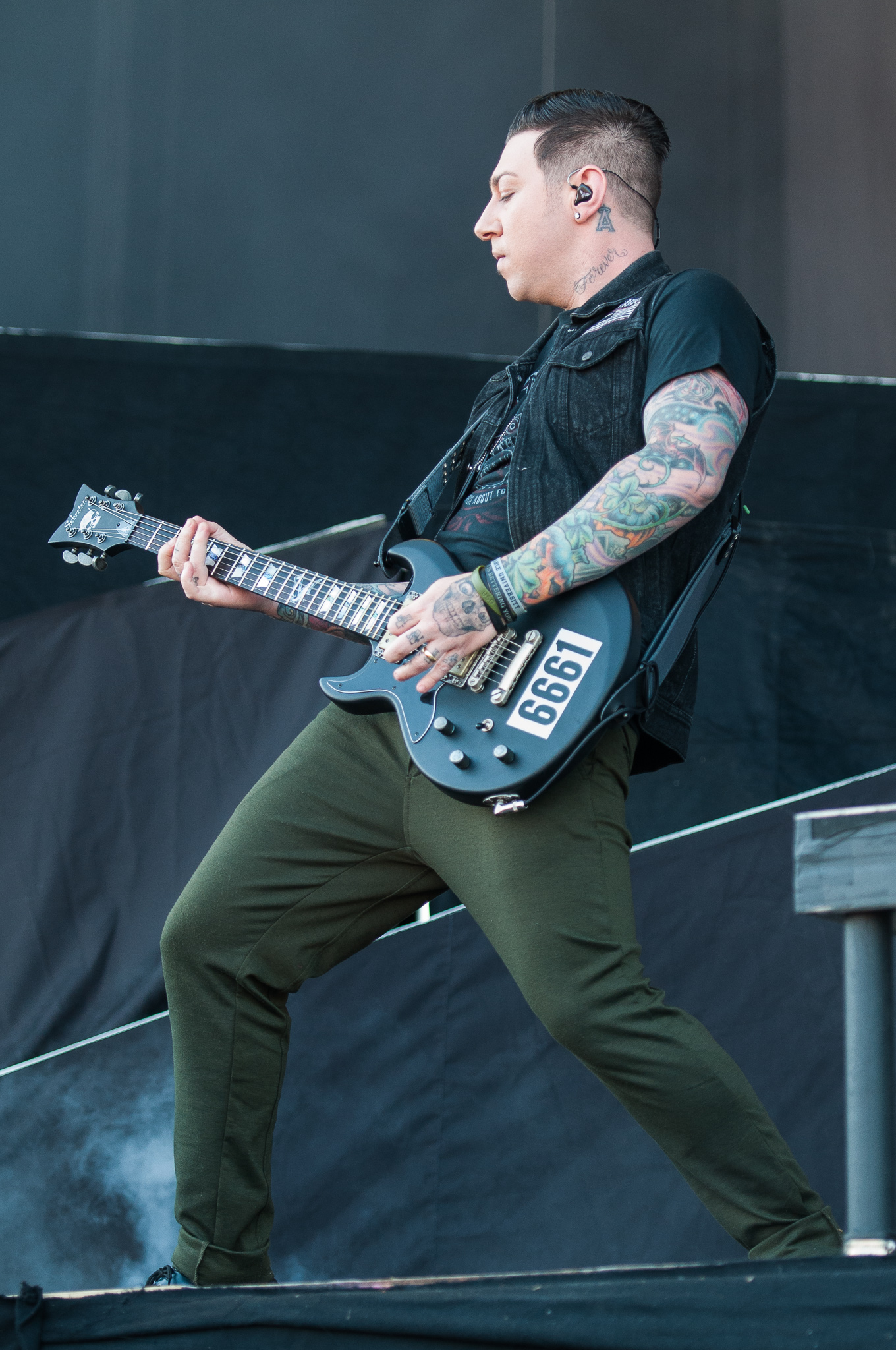 ARGO-Konzerte,Avenged Sevenfold,Konzert,Livekonzert,Livemusik,Musik,RiP,Rock im Park 2014,Zachery James Baker,Zacky Vengeance